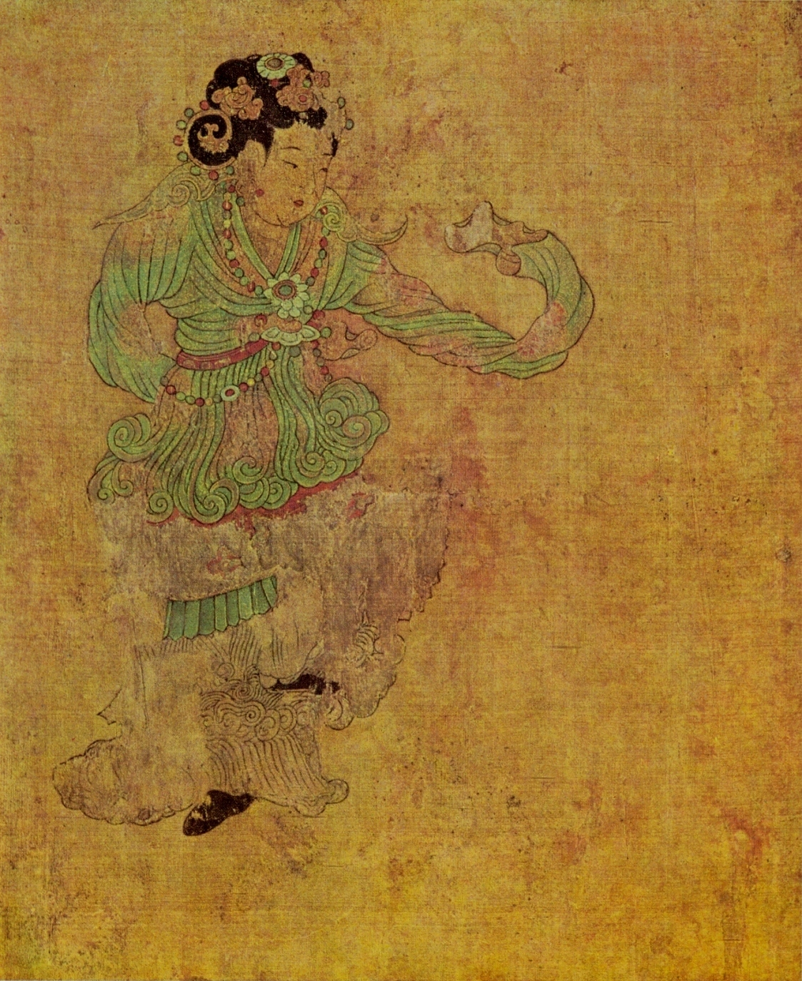 Юйчи Исен Танцовщик Свиток Беренсона Сеттиньяно